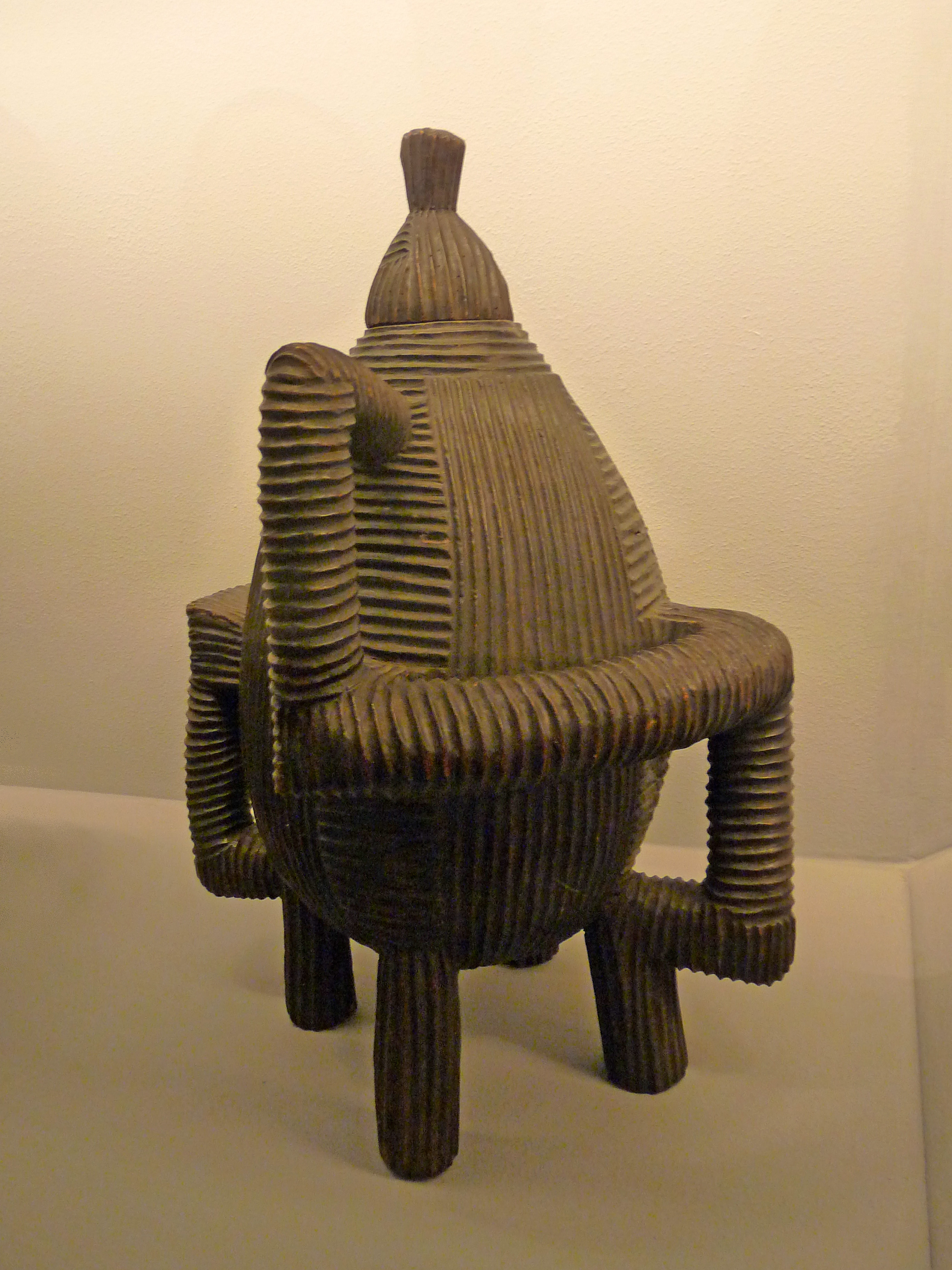 Récipient, population Swazi, Swaziland ou Afrique du Sud, 19e siècle, bois. Musée du quai Branly.